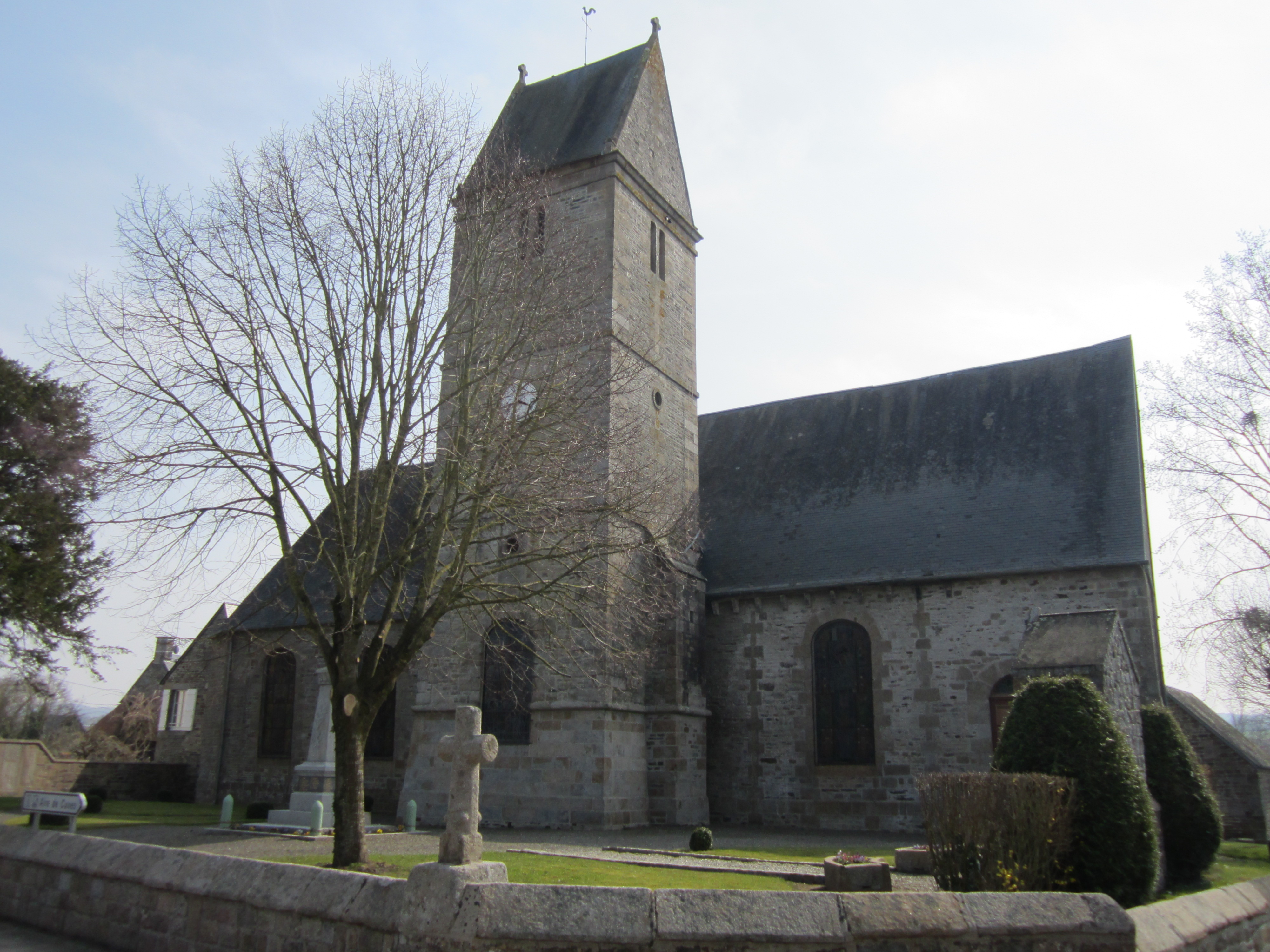 Église Saint-Denis de Cuves